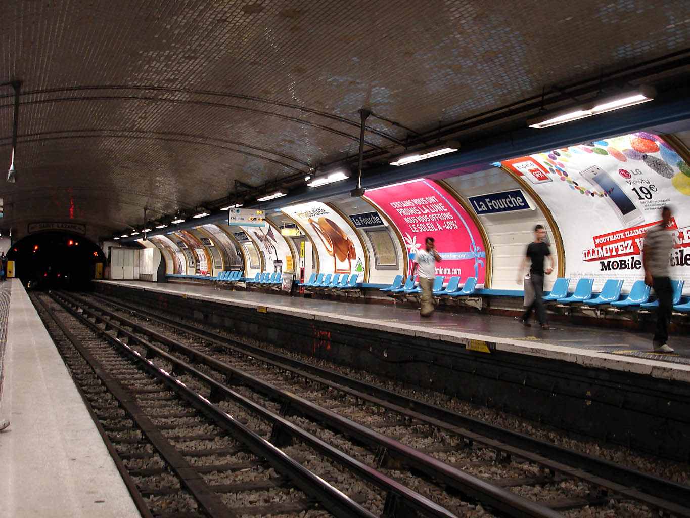 Station La Fourche, de la ligne 13 du métro de Paris, France.